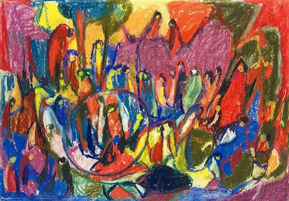 Figuren in Landschaft